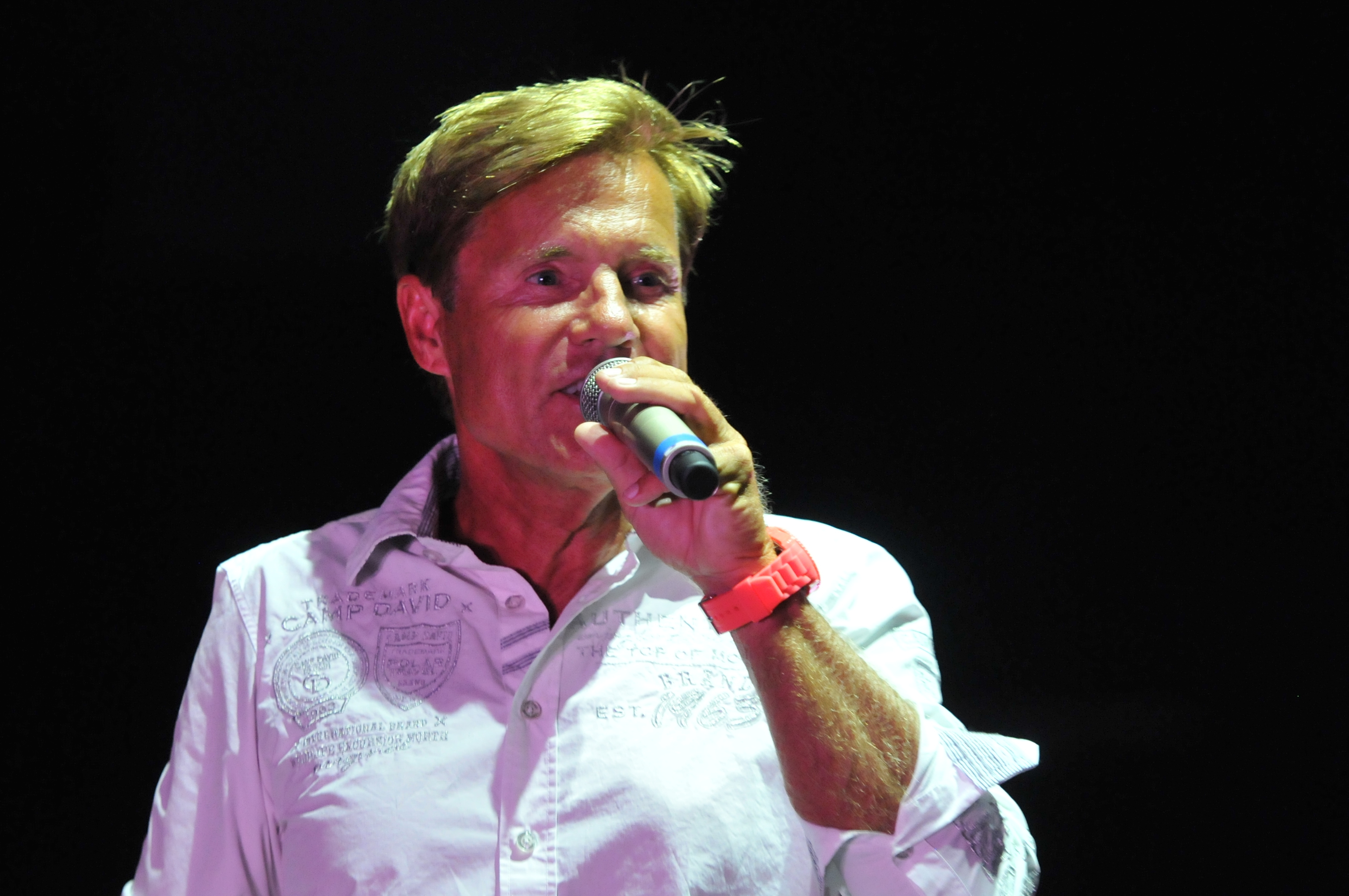 DSDS - Live on Tour. 27. Juli 2014, Stadthalle Wien.